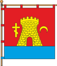 Прапор Очакова